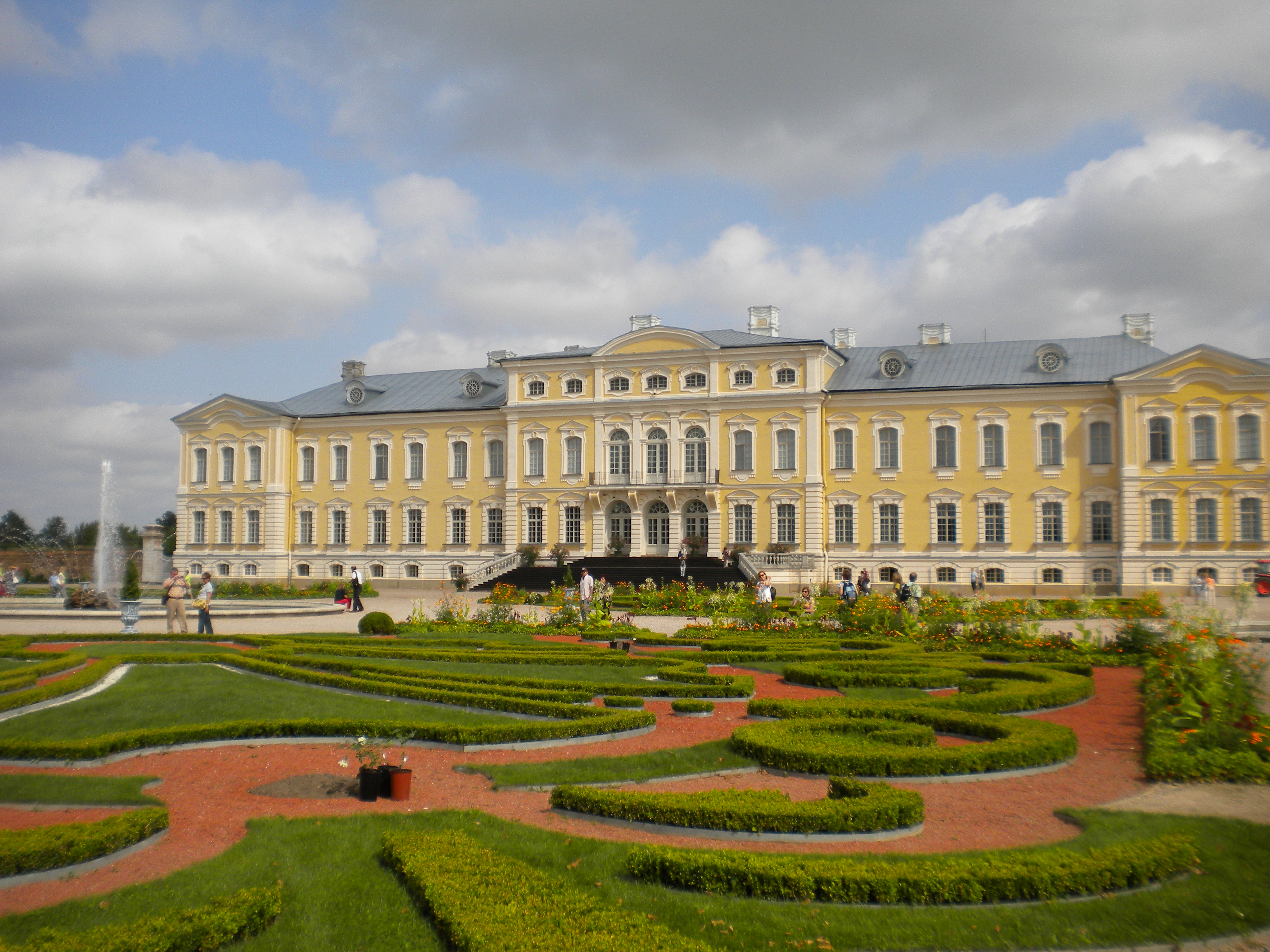 Vista de la façana principal del Palau de Rundale (Letònia)